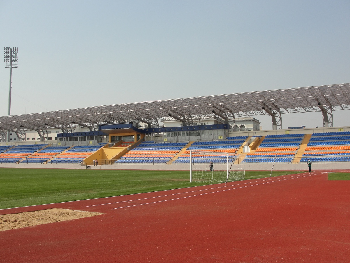 Стадион "Спартак" (обновленный)